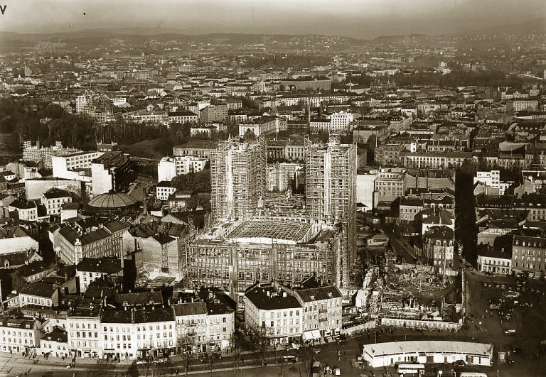 Bygging av Rådhuset, den gamle bebyggelsen i Pipervika måtte etter hvert gi plass til den nye Rådhusplassen, Sjøgaten, Rosenkrantzgate